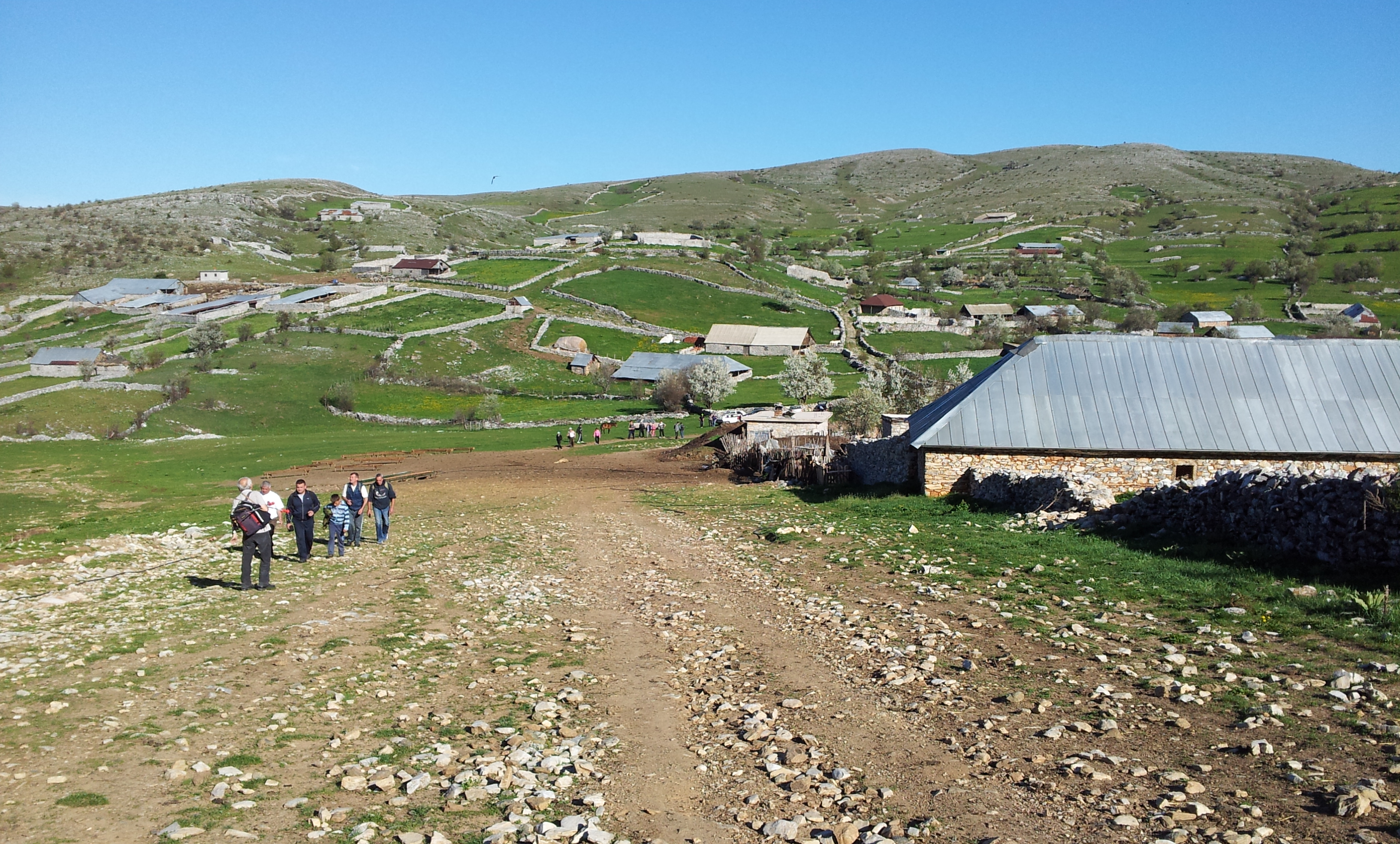 Почеток на Планинарскиот марш Гургурница - Требовле 2012, од кај Гургурничките бачила